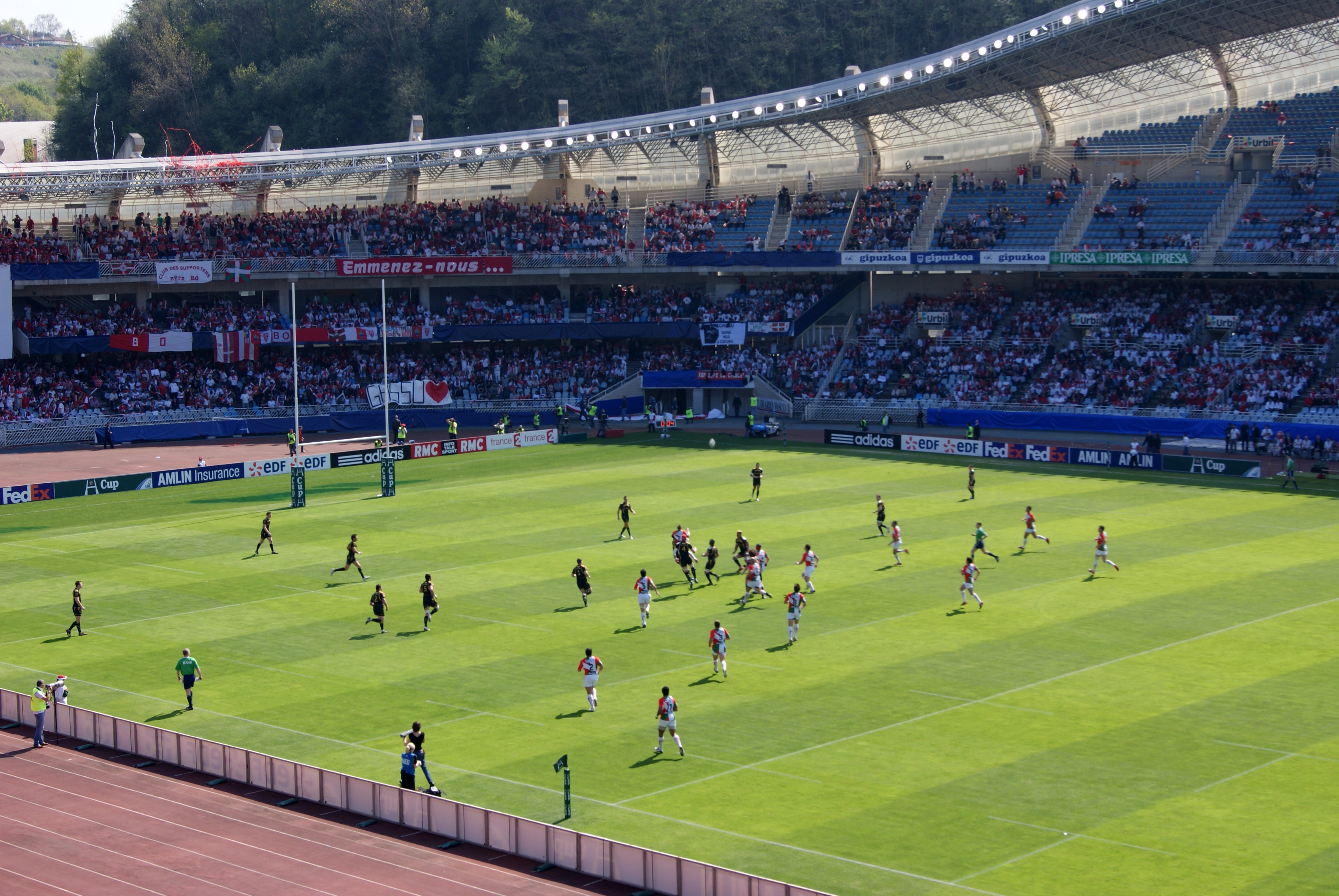 Anoeta II.